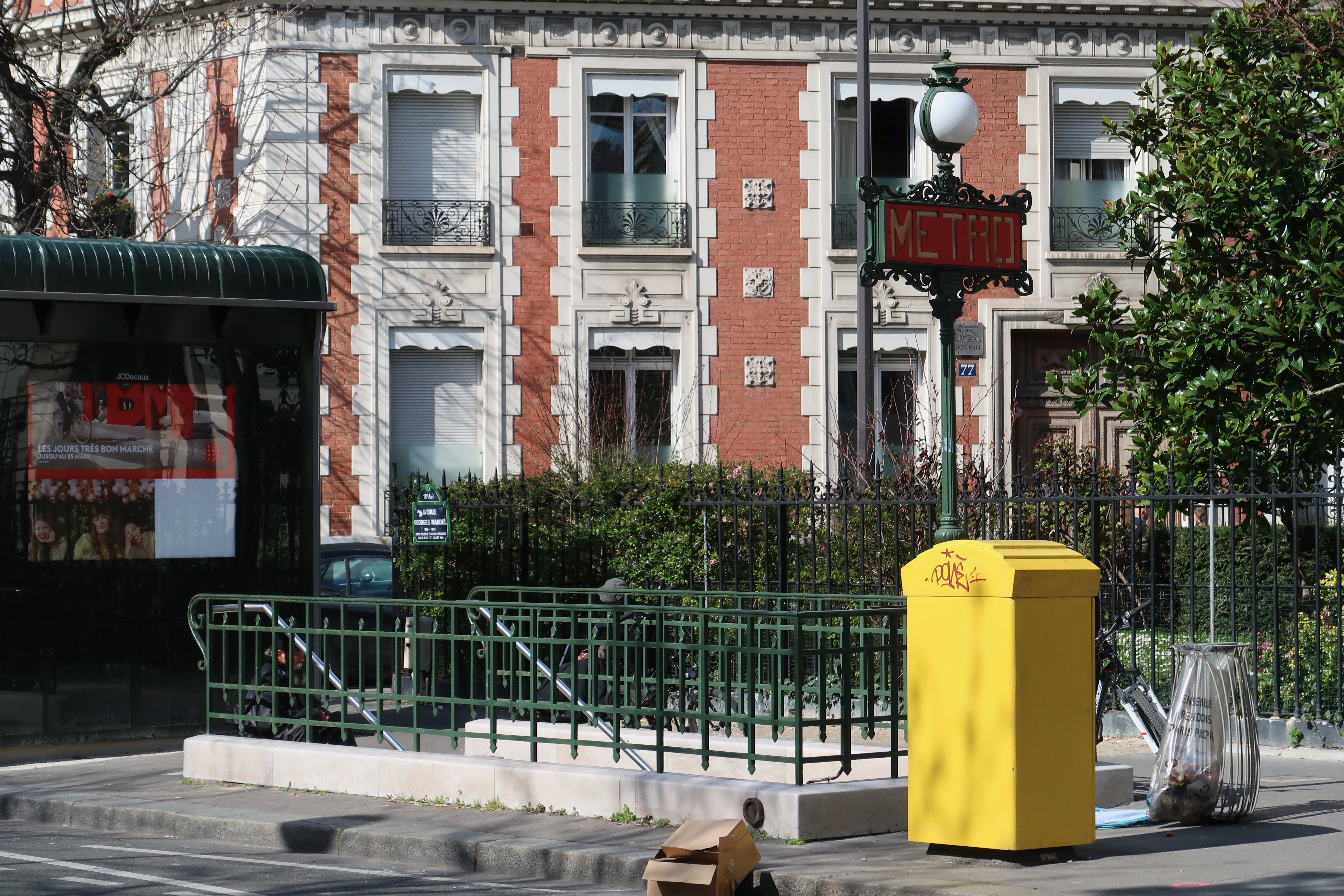 Sortie du métro rue de la Pompe (Paris, 16e).